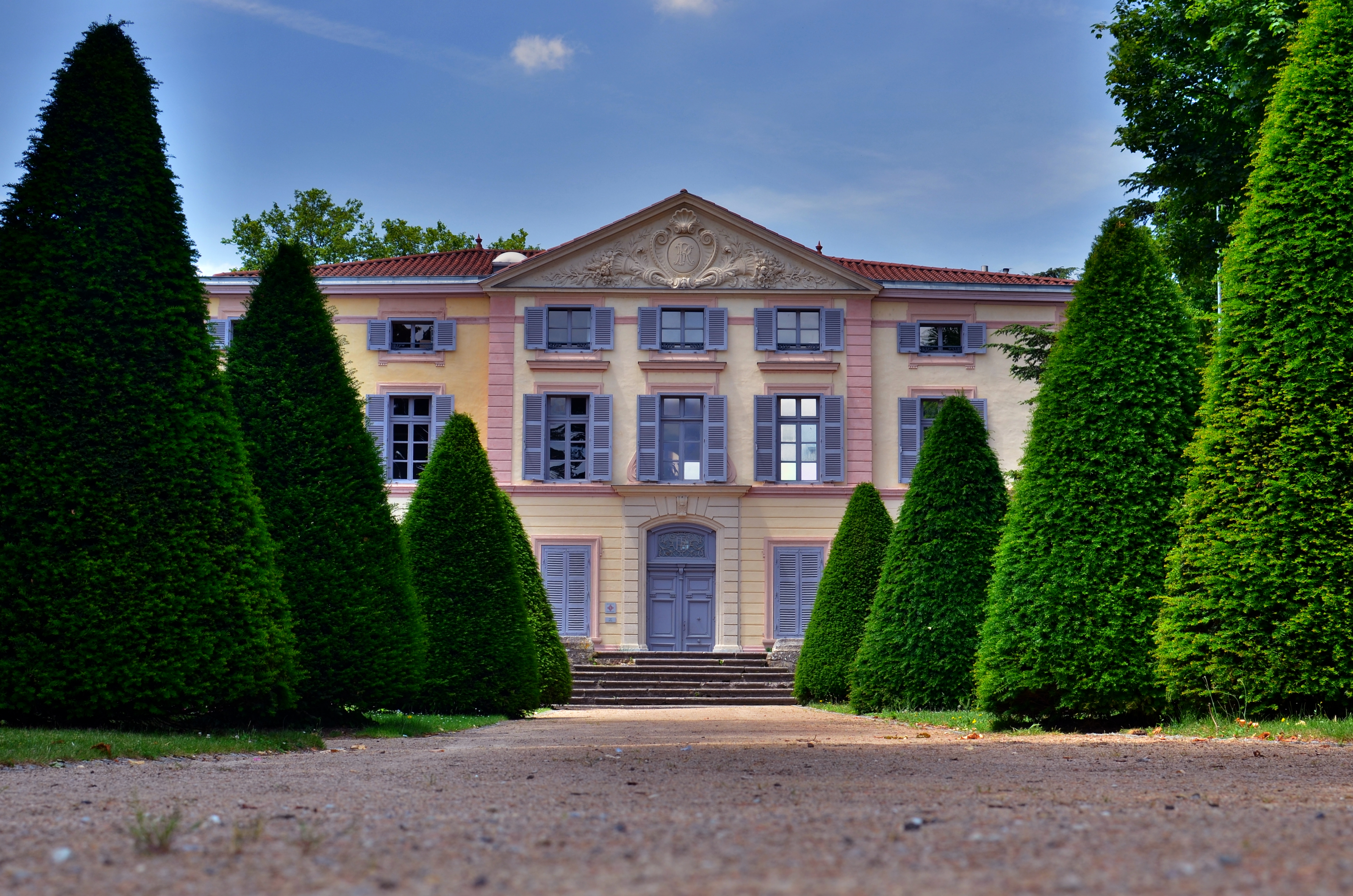 Façade arrière de l'Hotel de Ville de Grigny. Ancien château de Jeanne du Clapier, XVIIème siècle. Crédit: G.MOULINphotographies©